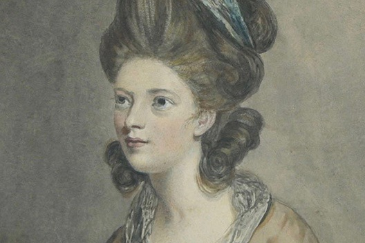 James Northcote (1746–1831): Lady Elizabeth Hamilton, Countess of Derby (1753–1797), nach Joshua Reynolds (1723–1792), ca. 1776.